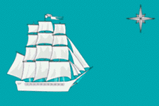 Flag of Sovietskaya Gavan